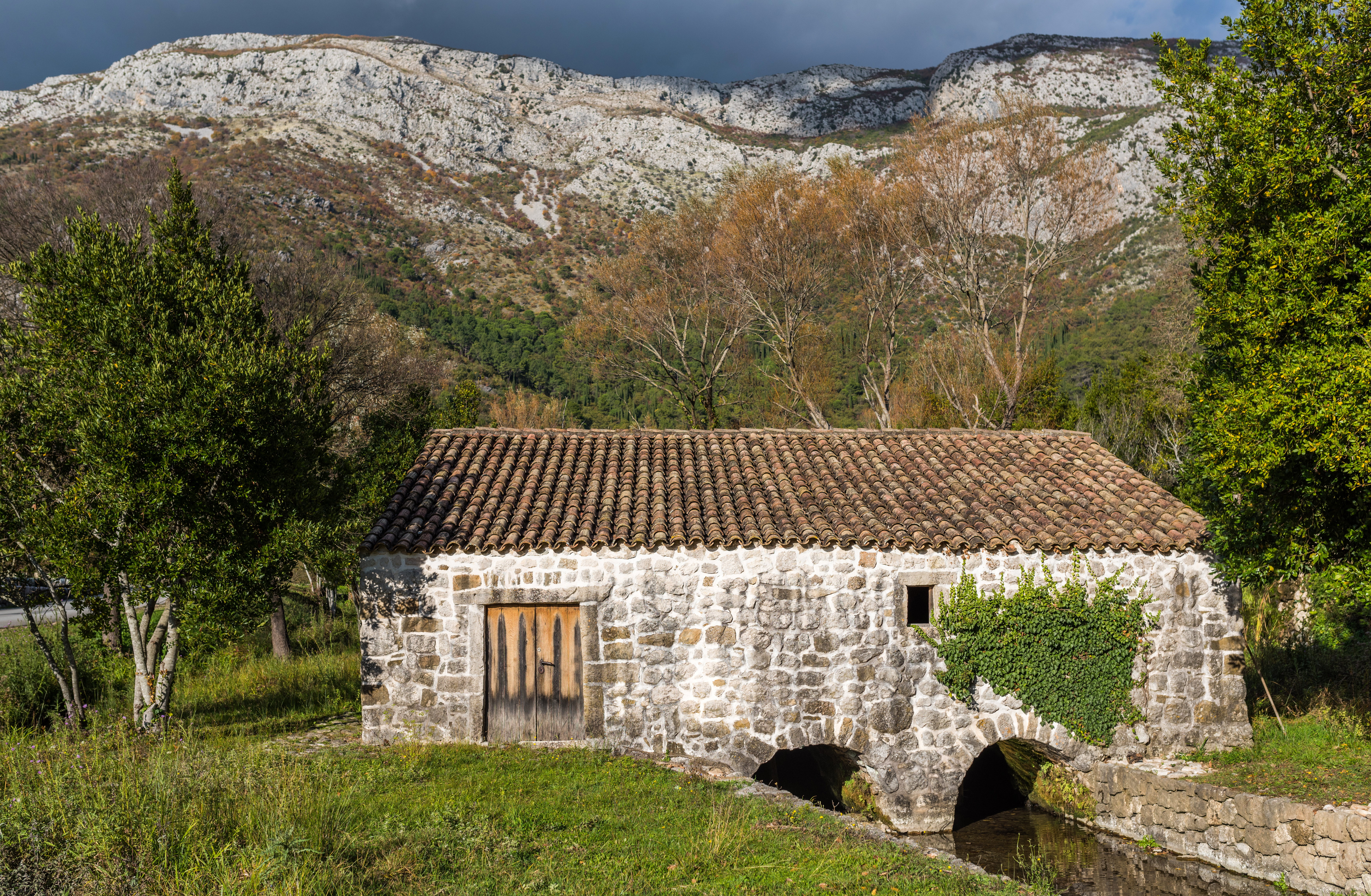 Dubrovnik Croatia November 2017